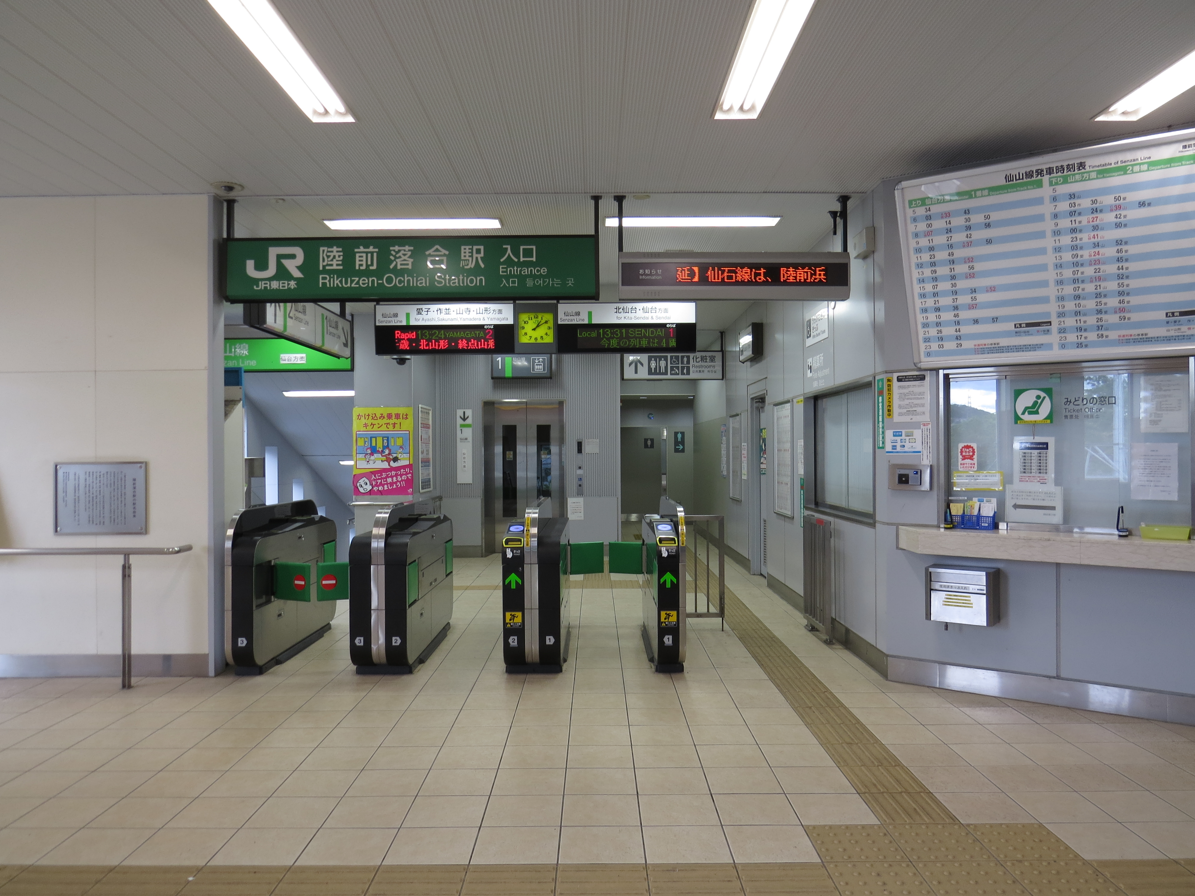 JR東日本 陸前落合駅 改札口